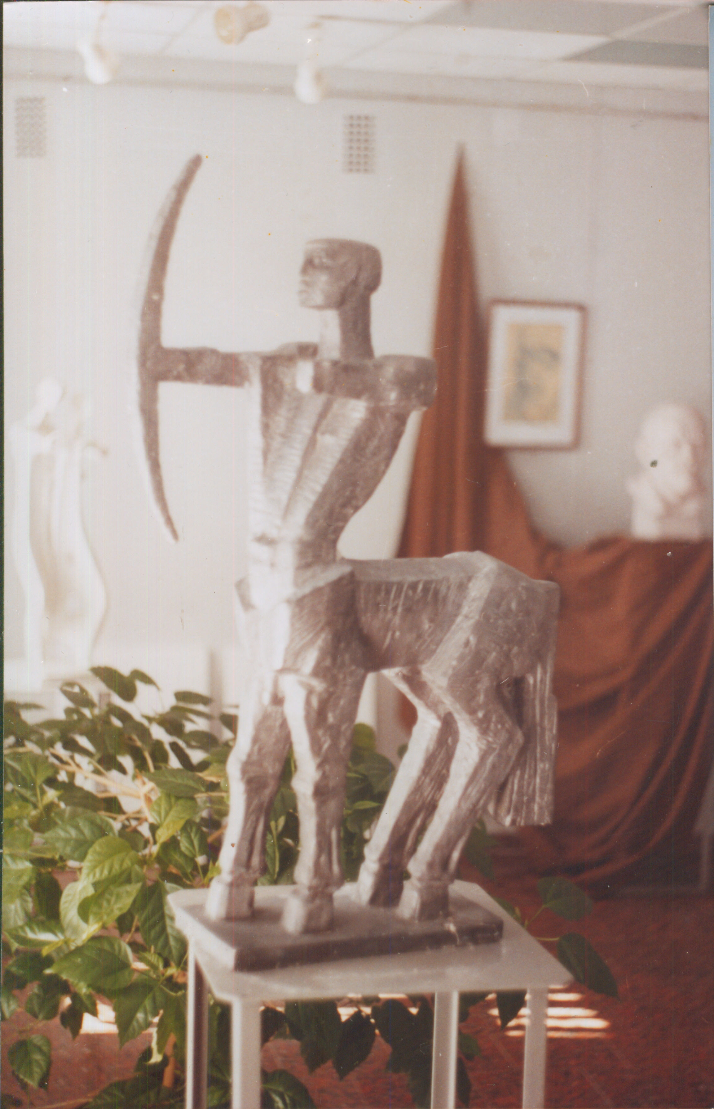 Константин Козловский. Кентавр, гипс,88,5 см, 1993 г.